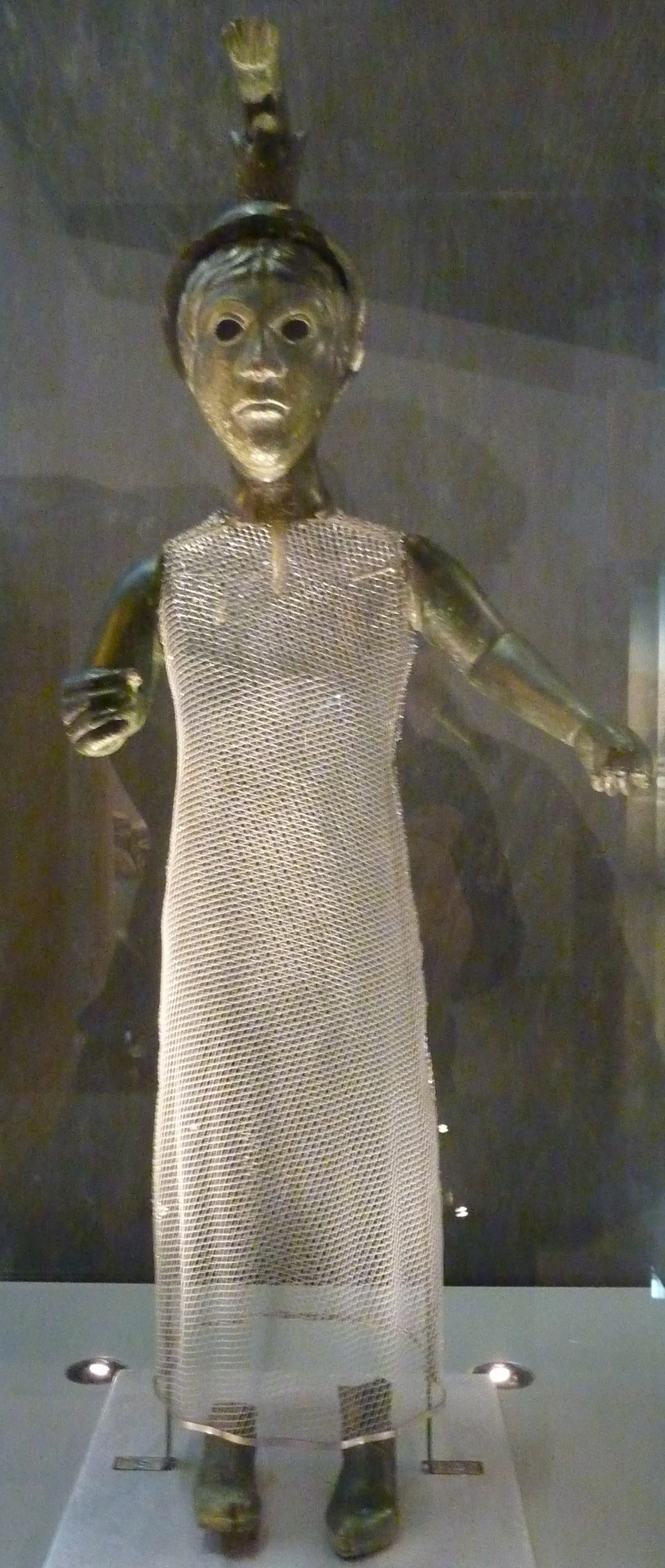 Dinéault : statue de la déesse Brigit (statue datant du 1er siècle après J.-C. trouvée au pied du Ménez-Hom ; cette statuette mêle des influences romaines (port d'un casque romano-corinthien) et celtes (traitement de la chevelure et du visage). Il s'agit probablement de la déesse Brigit, déesse du feu, de la fécondité et de la prospérité, que l'on peut assimiler à la déesse romaine Minerve.